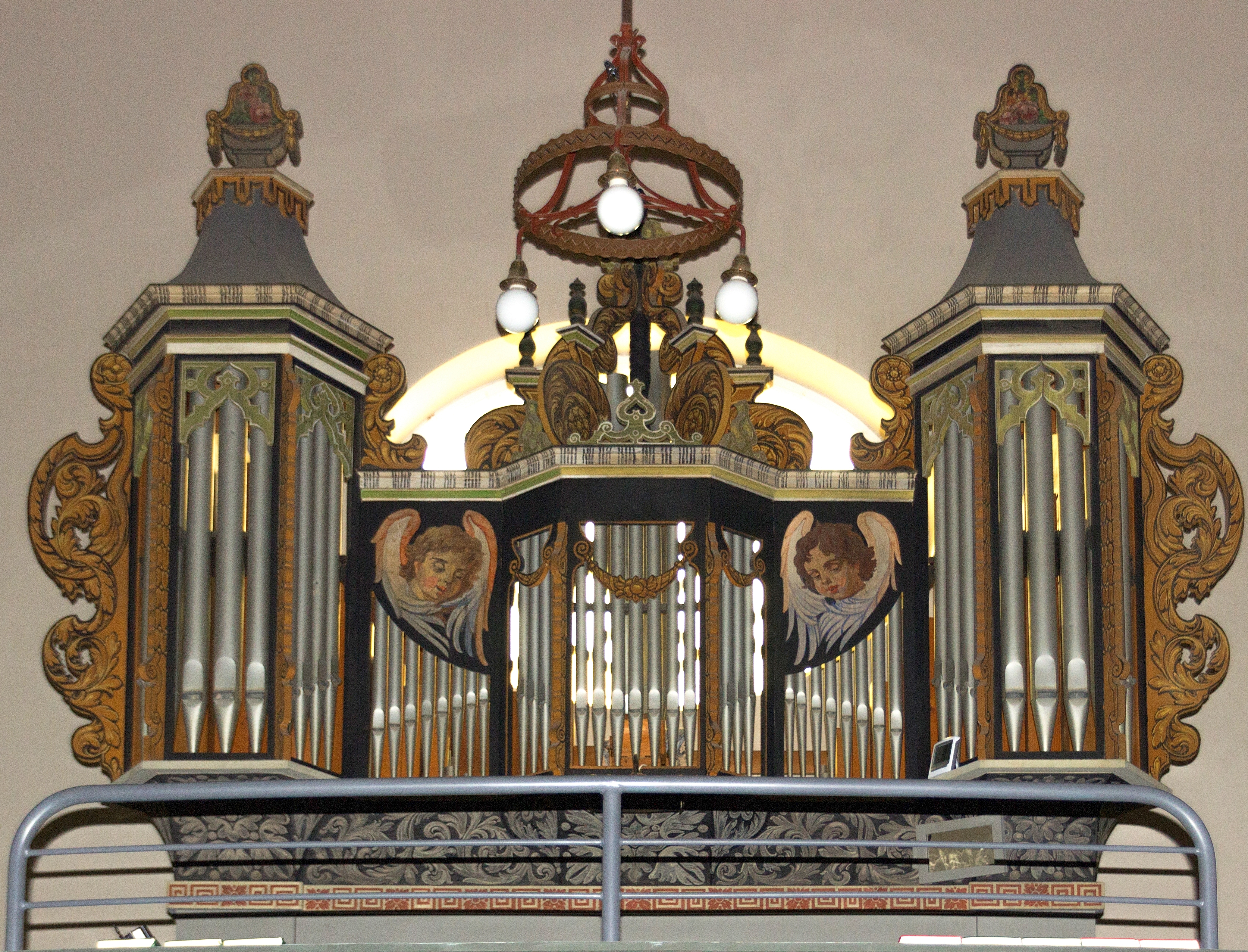 Dorfkirche Hohen Neuendorf Orgel